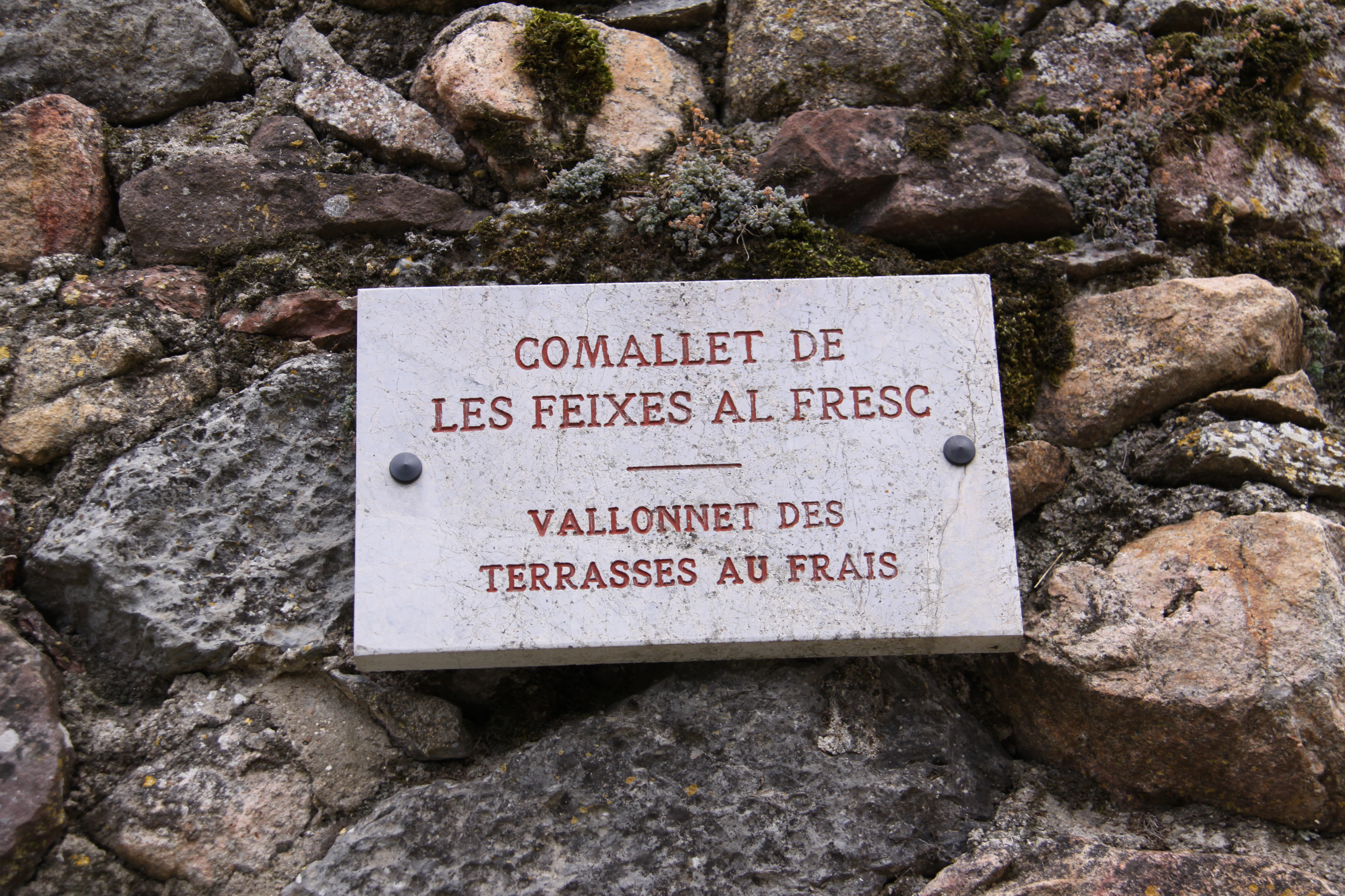 Nom de rue de Coustouges. Coustouges, Pyrénées-Orientales, France.